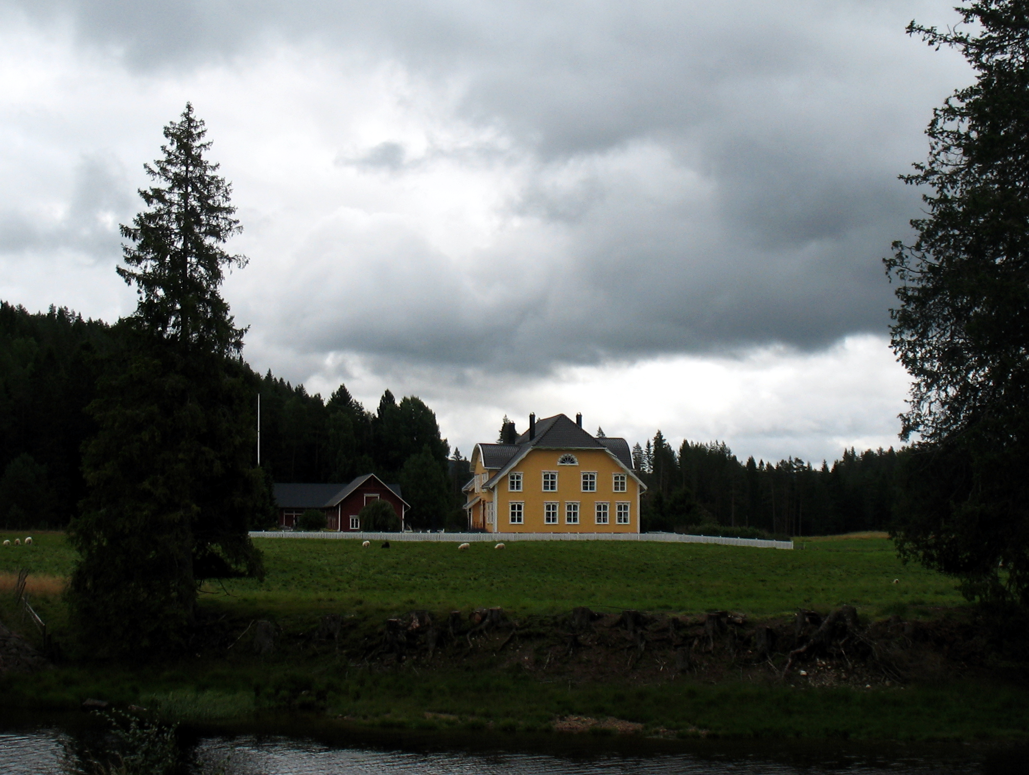 Garden Baas i Dølemo, Åmli ved Hegglandsåna, riksvei 41. Aust-Agder fylke.